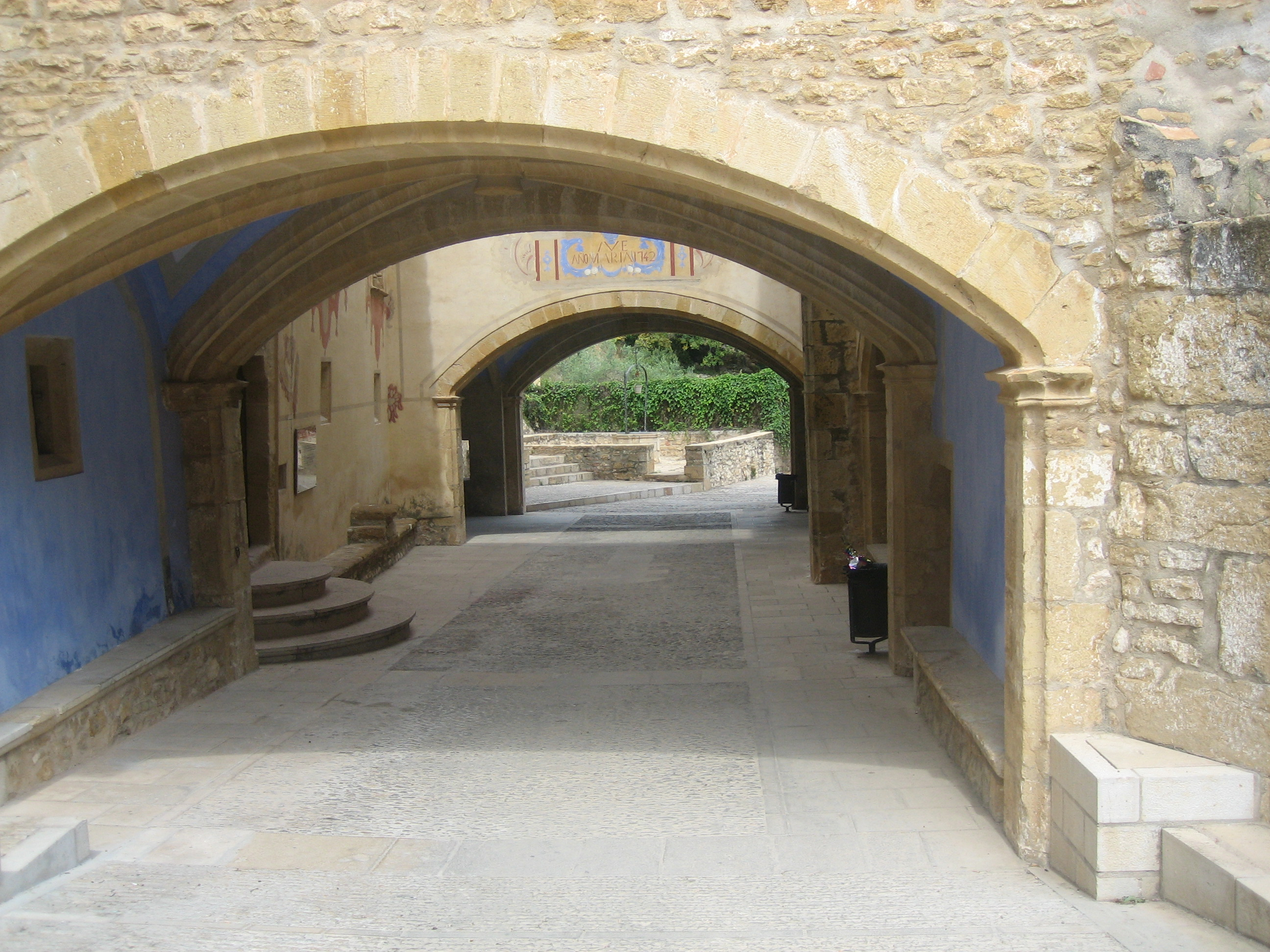 Accés sota un arc escarser al pati interior de l'hostatgeria de l'ermita de la Mare de Déu de la Font de la Salut de Traiguera (Baix Maestrat)